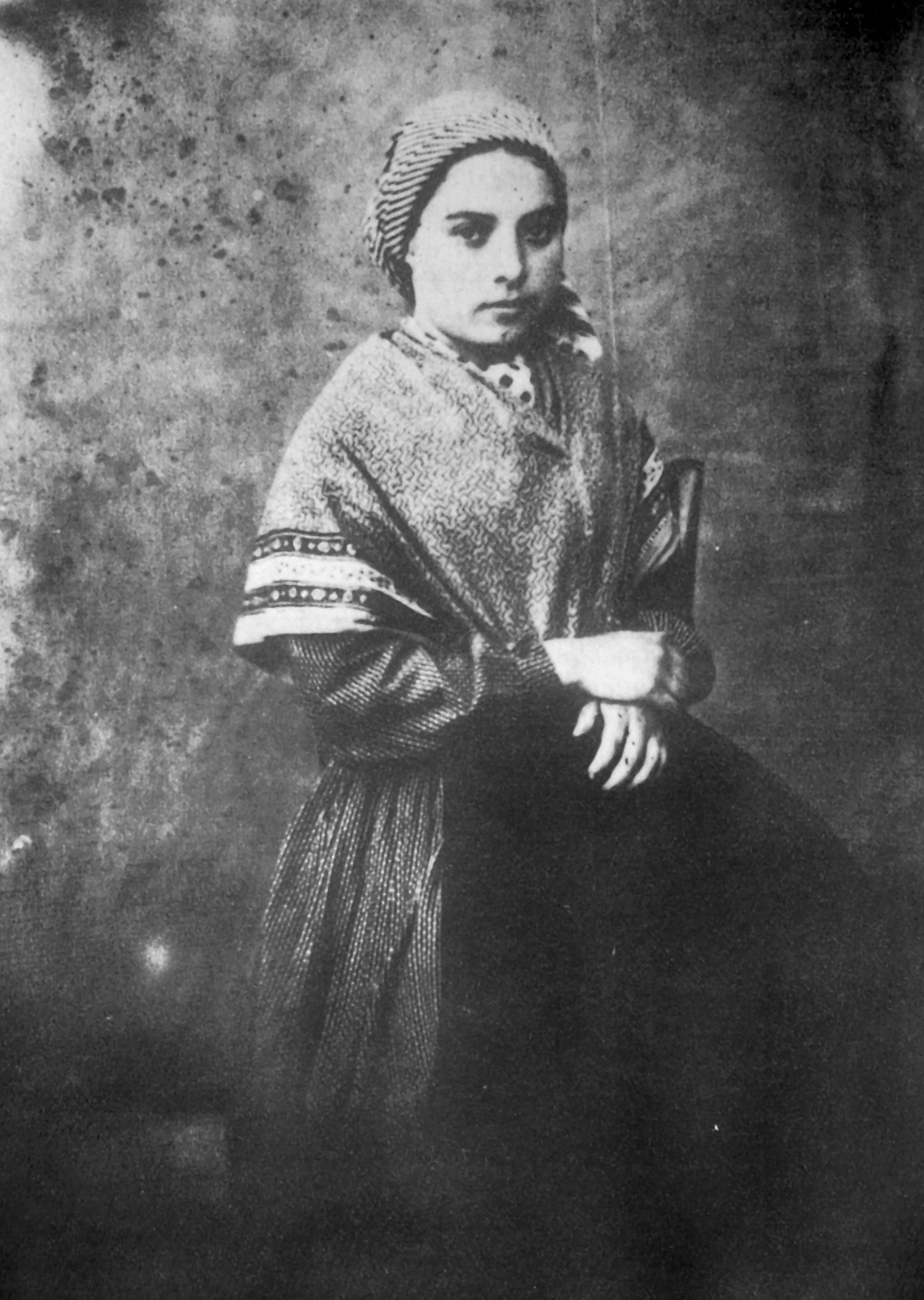 Photo de Bernadette Soubirous en 1861 ou 1862